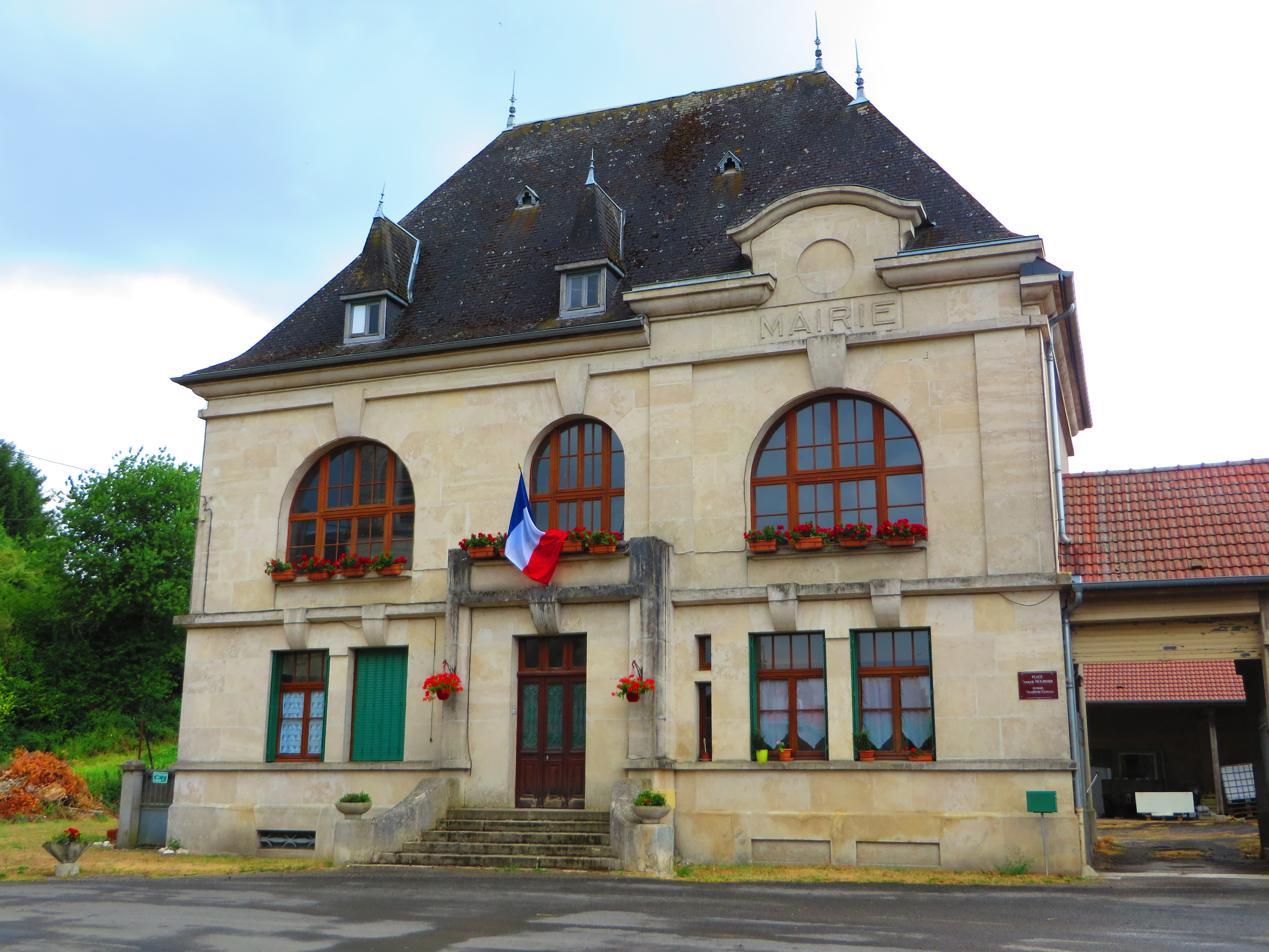 Avocourt la mairie